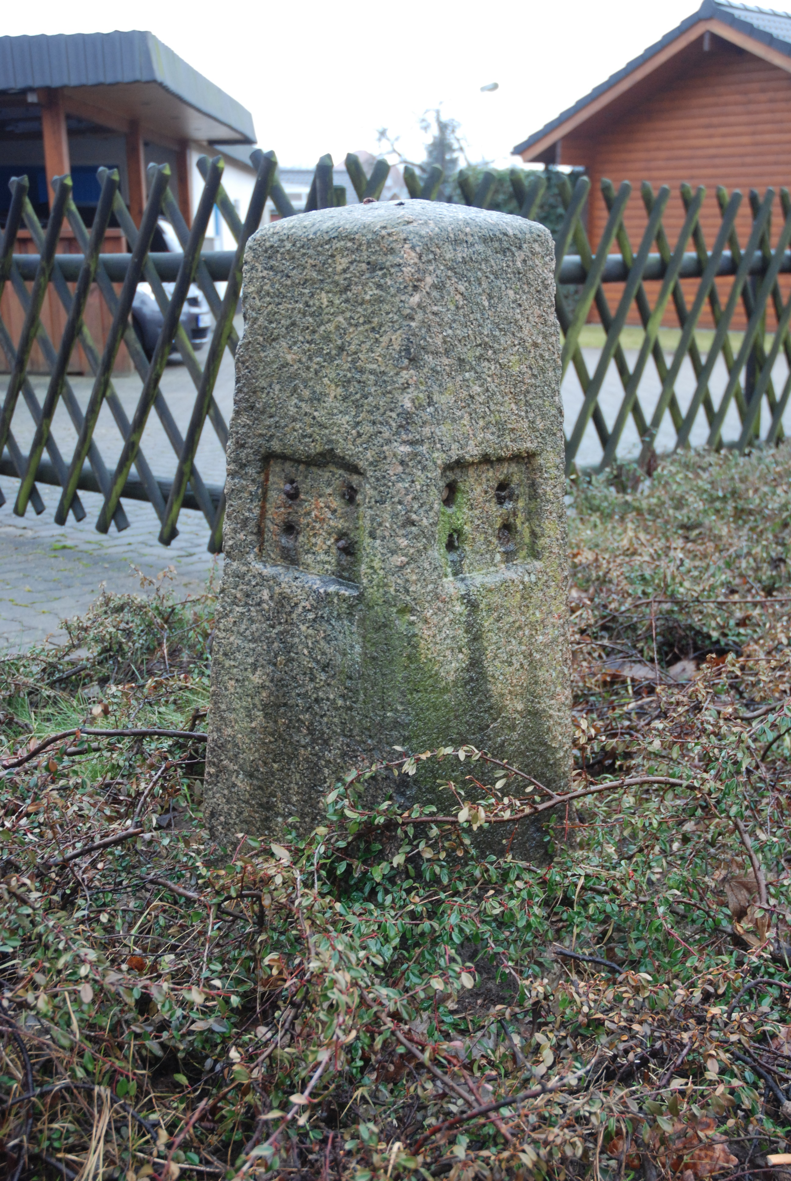 Meilenstein an der Bundesstraße 104, Plaketten entfernt